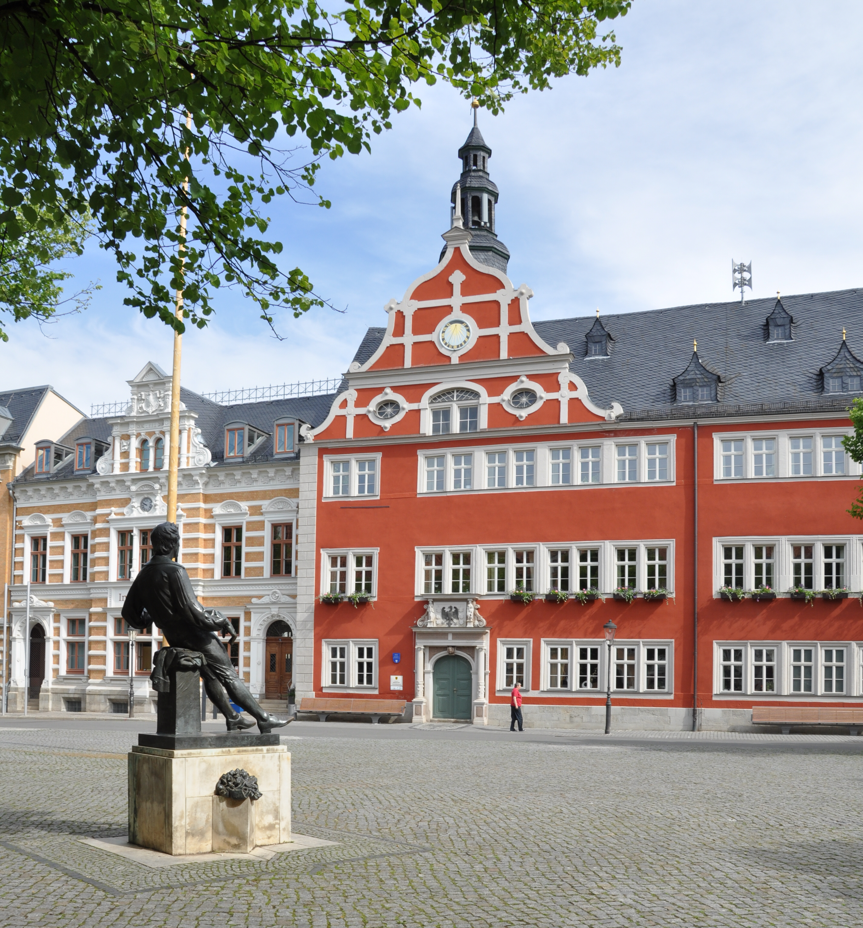 Arnstadt (Thüringen), Rathaus